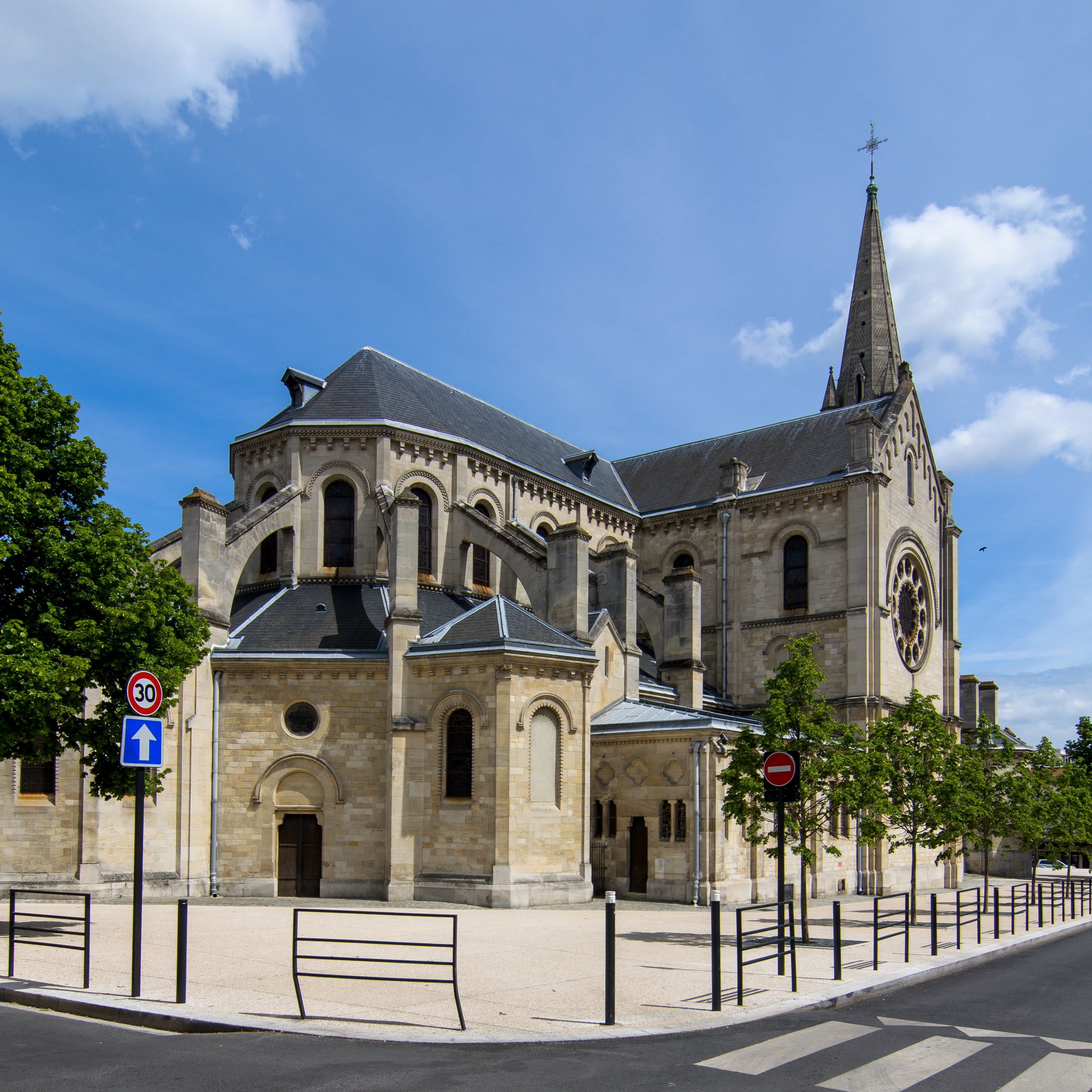 Chevet de la Basilique d'Argenteuil